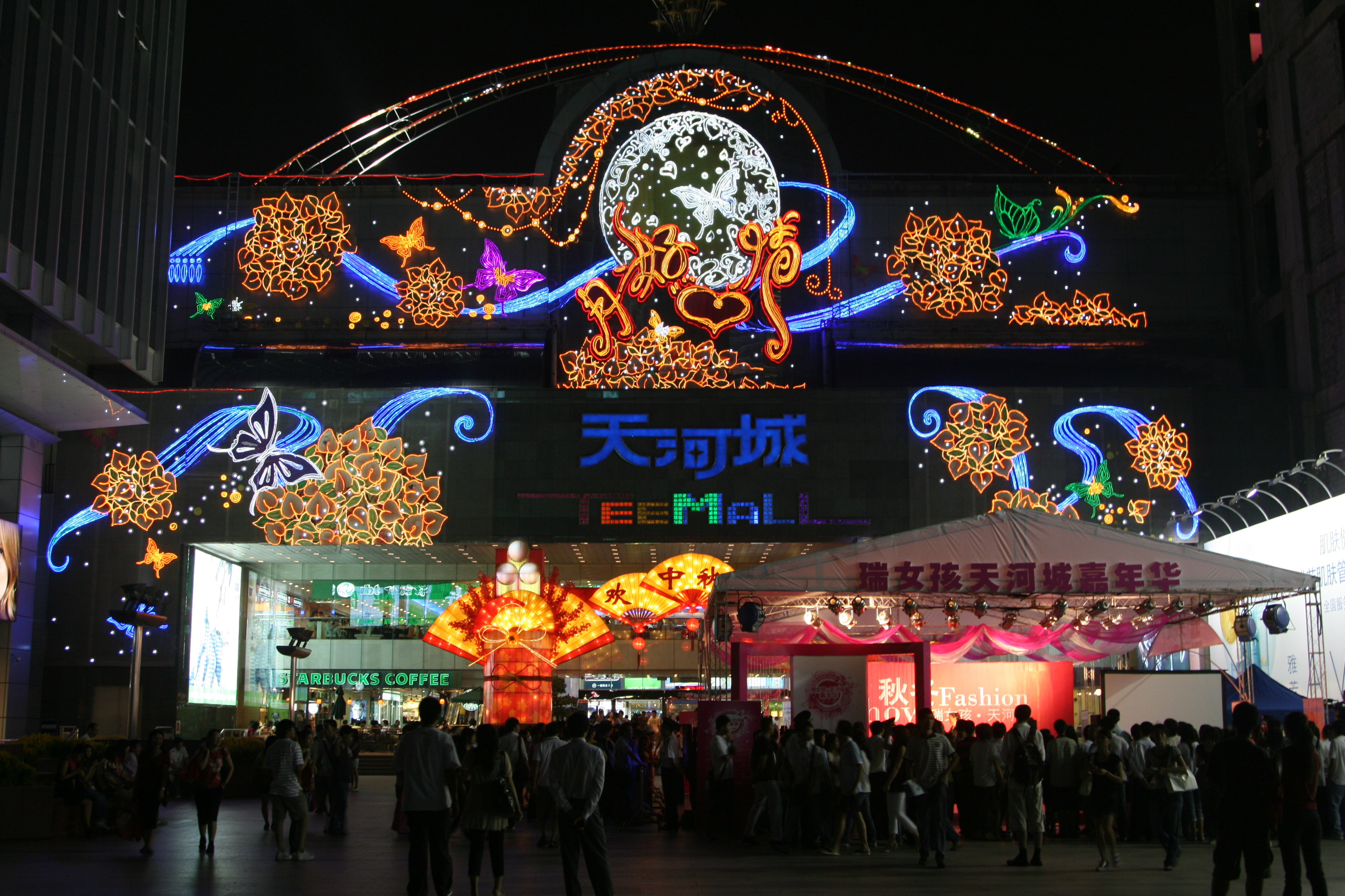 夜间的天河城